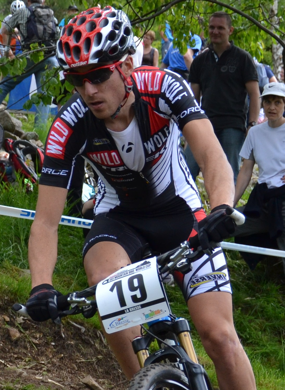 Sergio Mantecón lors de la 4e manche de la coupe du monde de VTT 2012 à La Bresse (FRA).